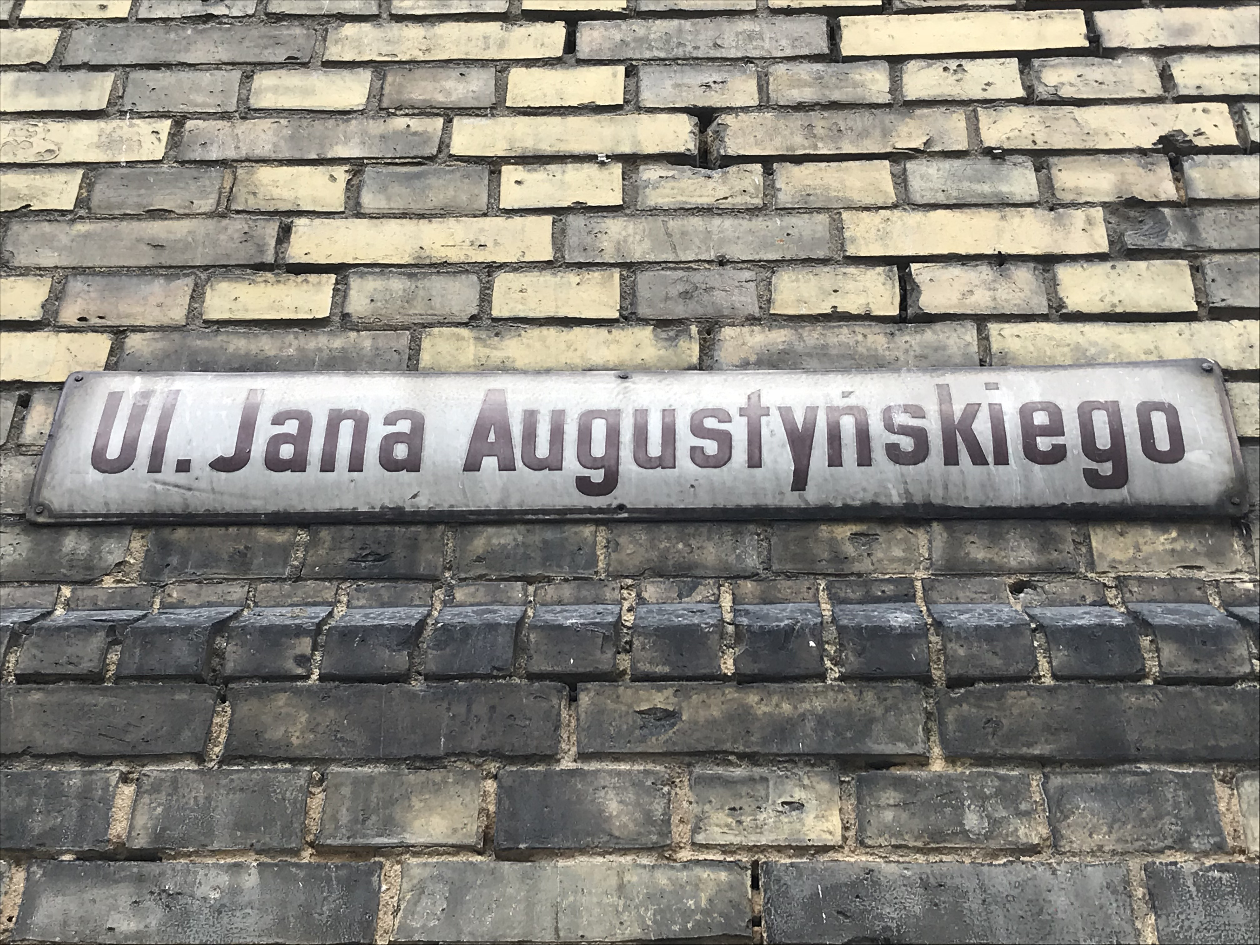 Gdańsk, tablica z nazwą ulicy Jana Augustyńskiego.